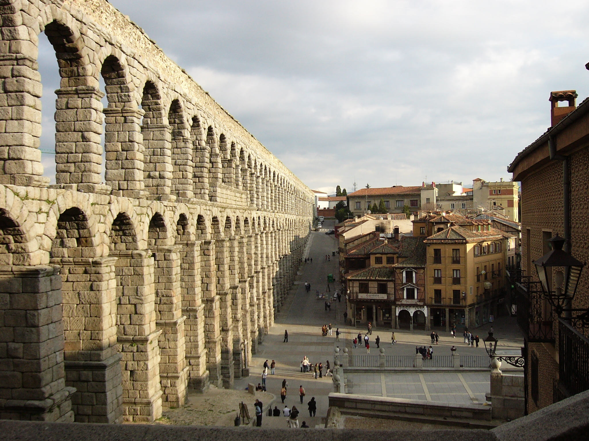 Acueducto de Segovia, situado en la ciudad Segovia.